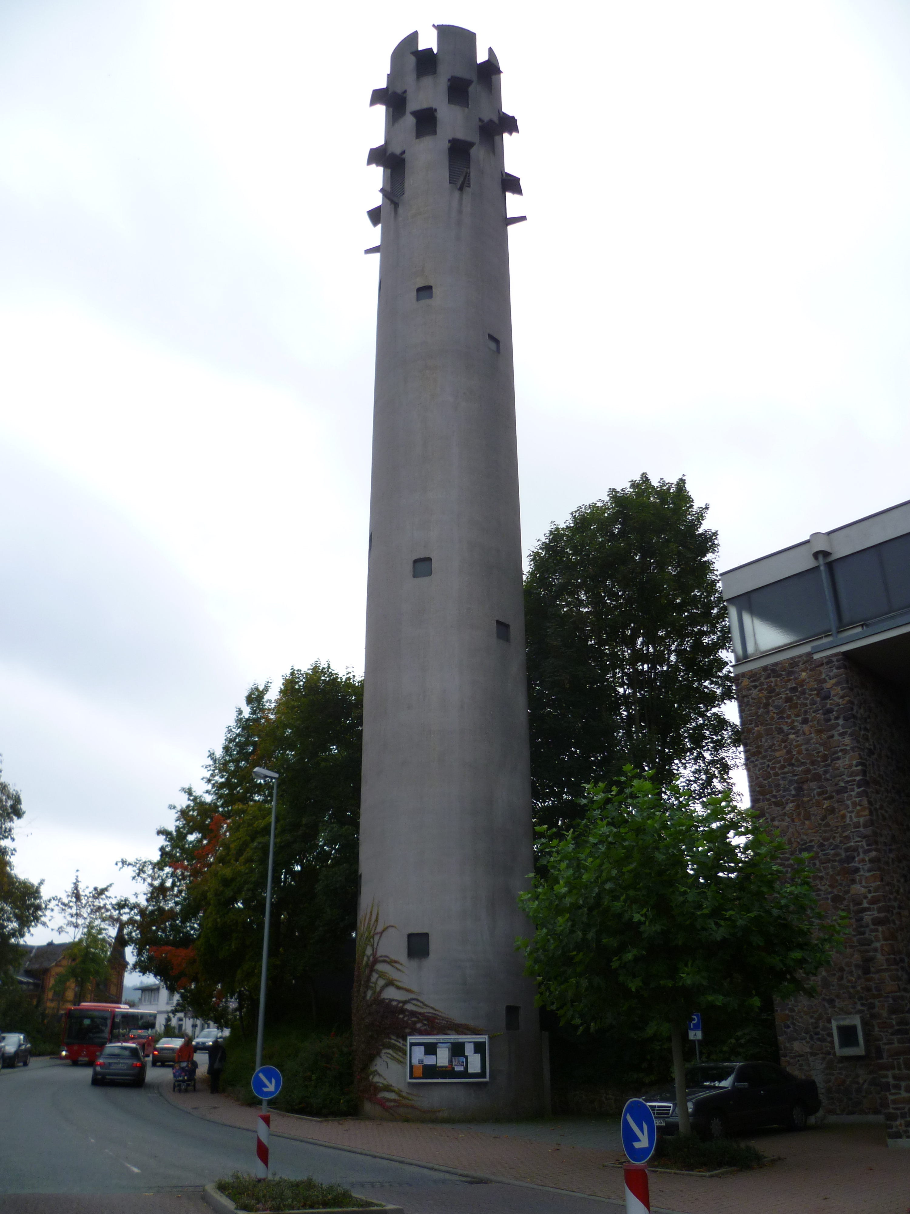 Katholische Kirche St. Martin in Idstein - Der Glockenturm